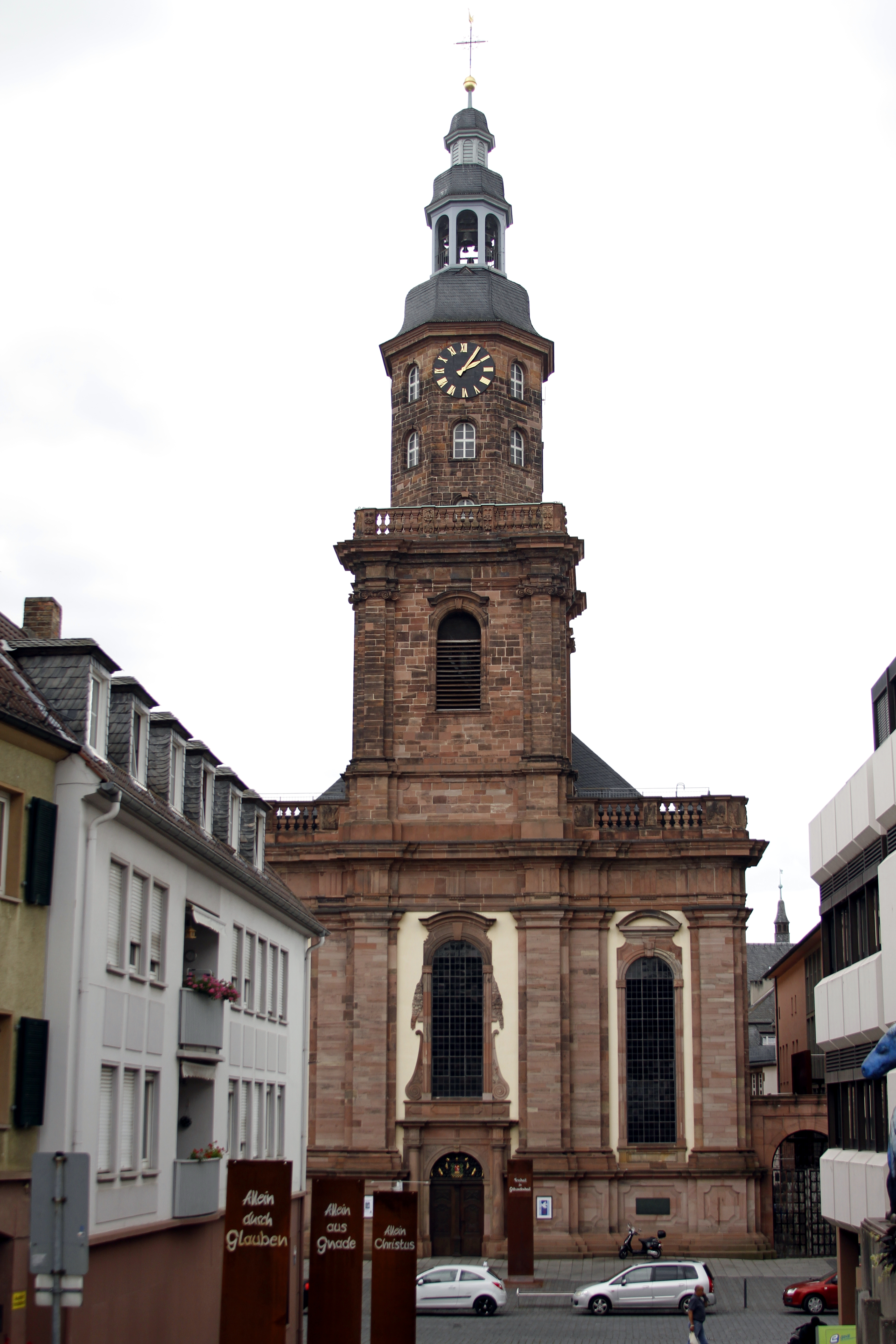 Dreifaltigkeitskirche - Worms - Germany